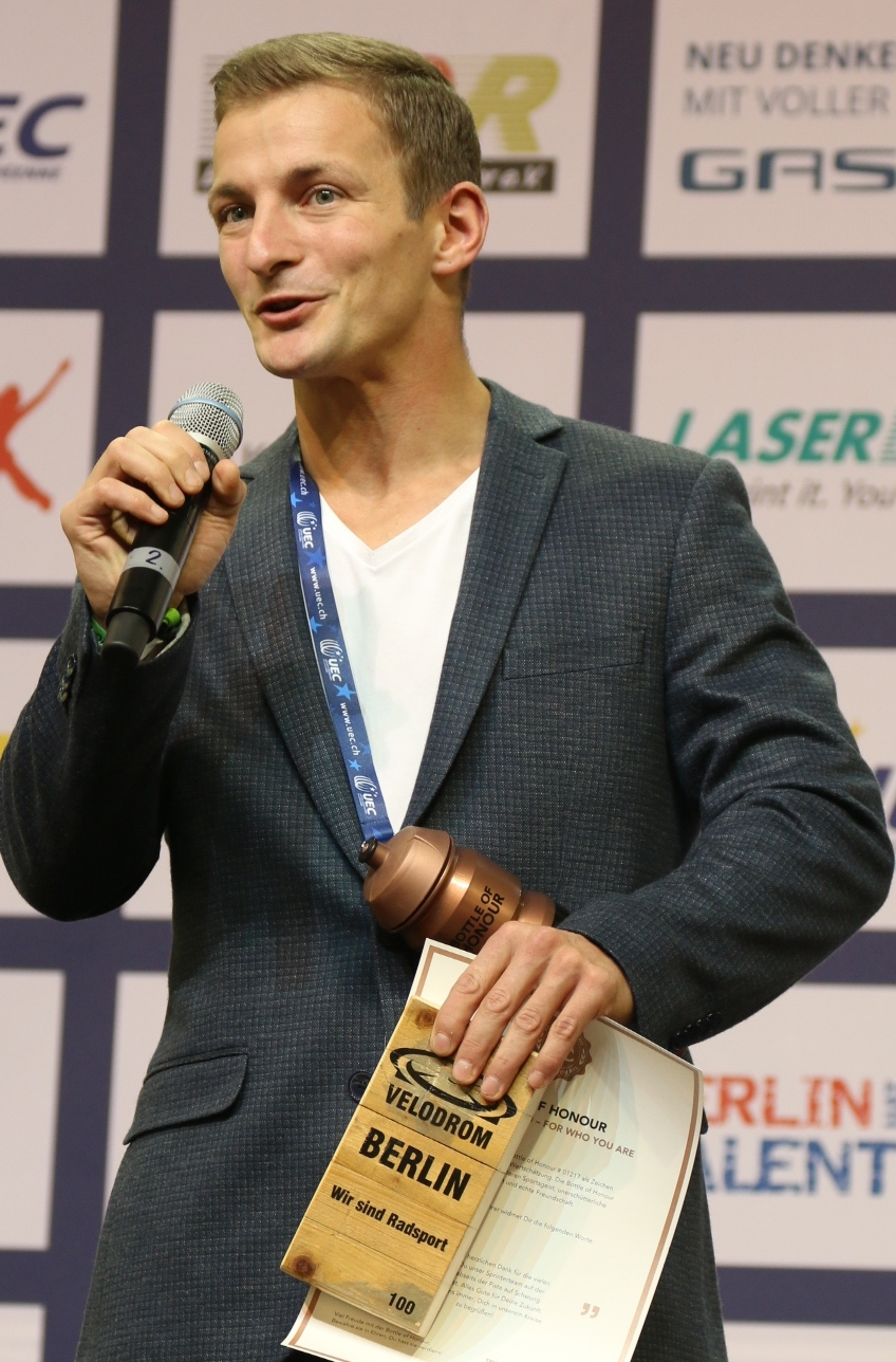 René Enders, deutscher Radsportler, bei seiner Verabschiedung von seiner aktiven Laufbahn bei der Bahn-EM 2017 in Berlin